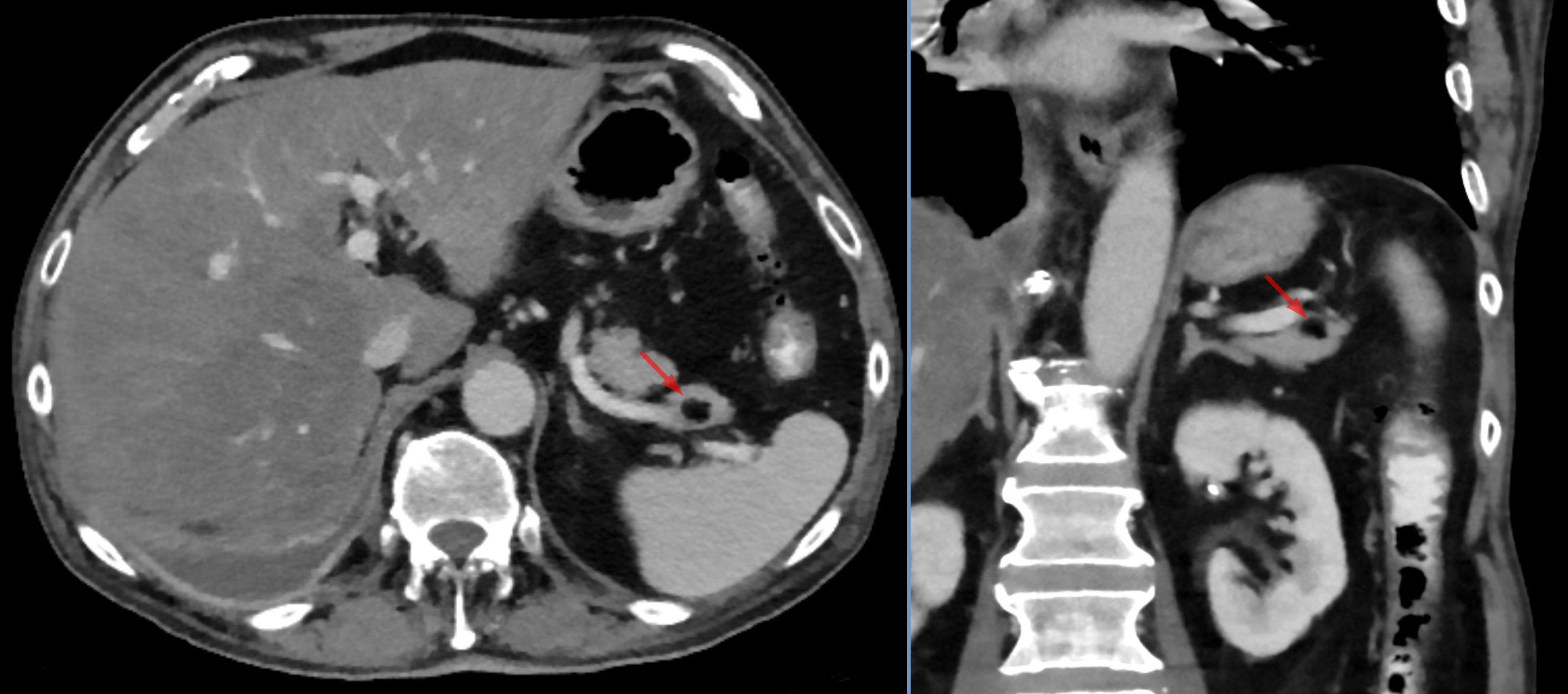 Lipom des Pankreas (im Gegensatz zur Pankreaslipomatose). Seltener Zufallsbefund hier in der Computertomographie axial und coronar. (Zusätzlich Verdacht auf Empyem der Pleura rechts.)